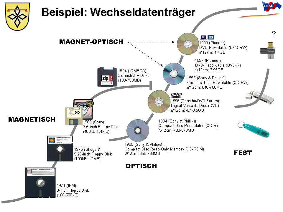 disruptive Innovation am Beispiel Wechseldatenträger